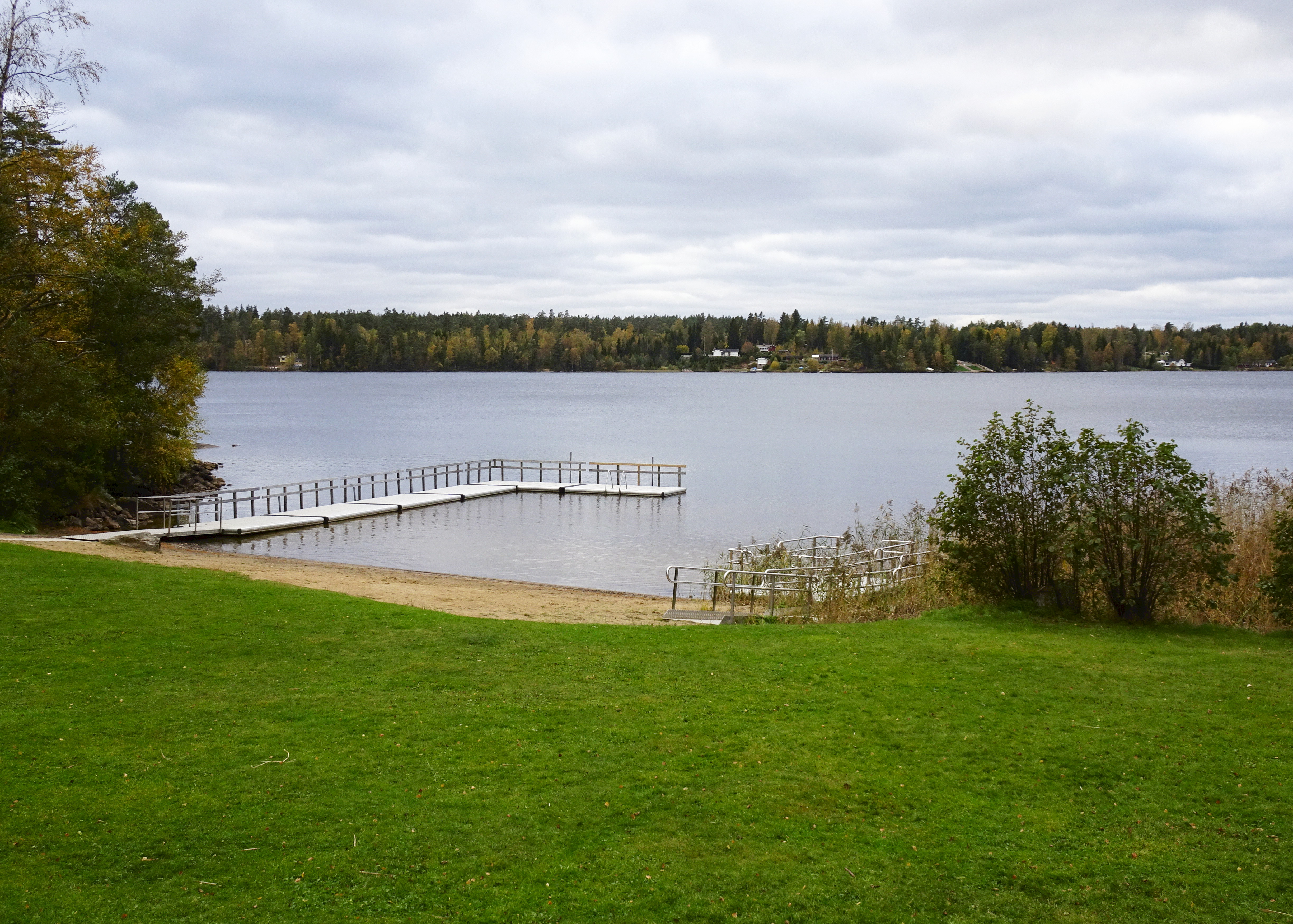 Malmsjön, Södertälje, sedd från Malmsjöns badplats